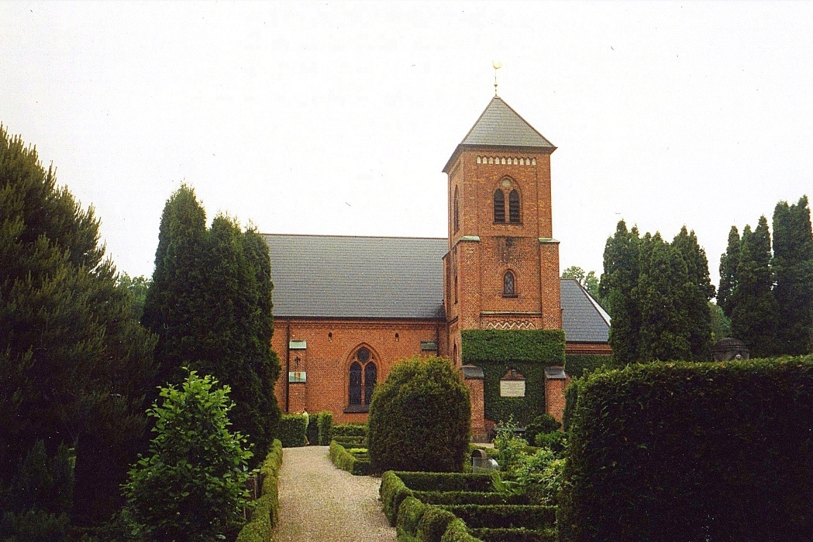 Taarbæk Kirke, Taarbæk Sogn, Lyngby-Taarbæk Komune